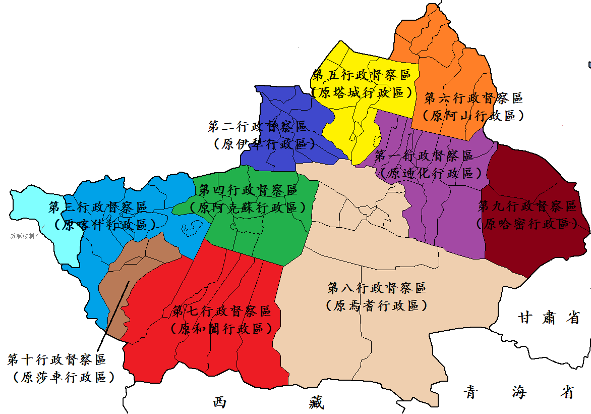 文言: 中華民國卅二年之新疆省區劃